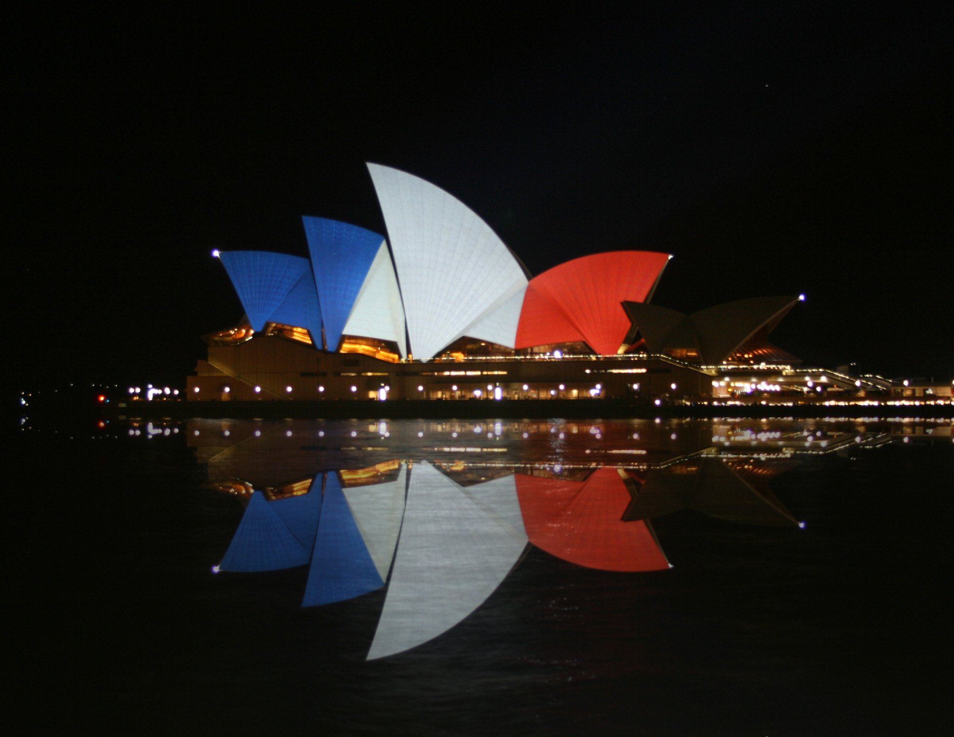 Sydney Opera House les 14, 15 et 16 novembre 2015 - Couleurs du drapeau tricolore français.